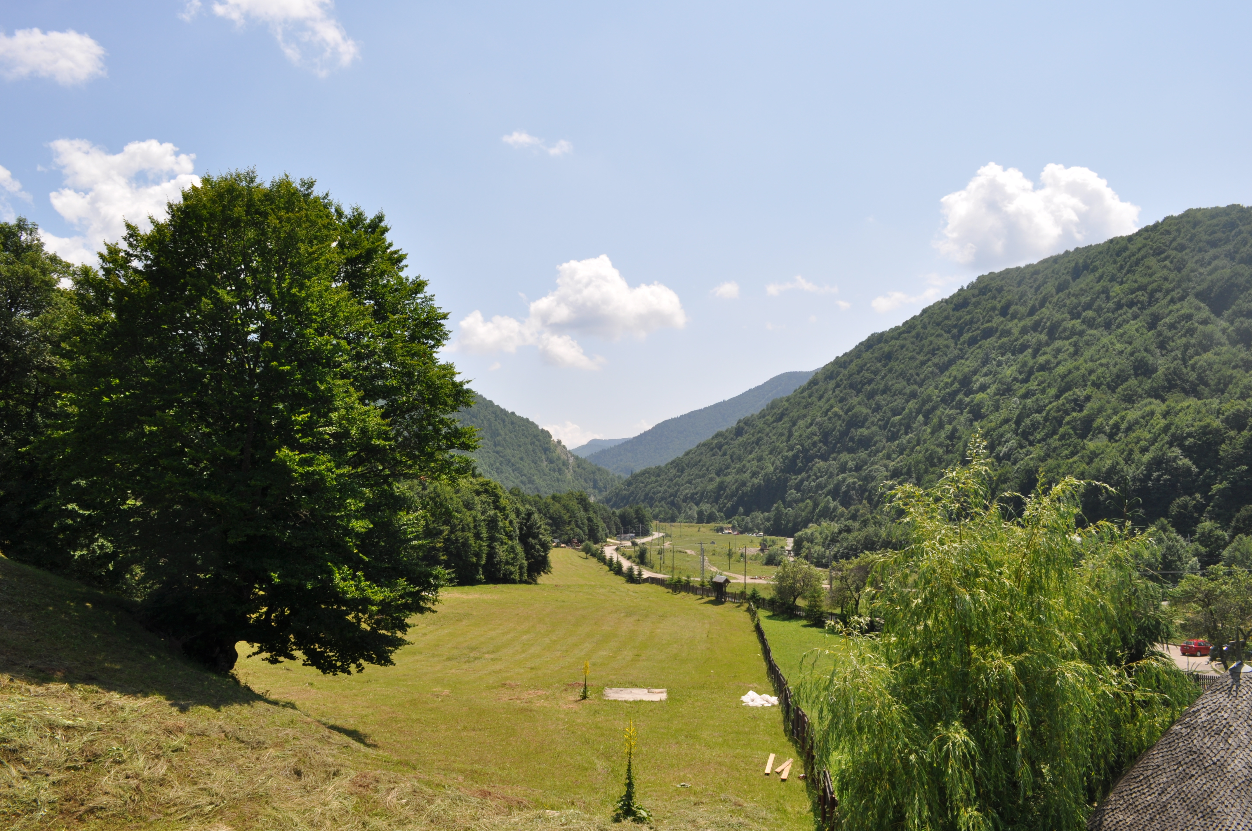 Mănăstirea Lepșa, Vrancea